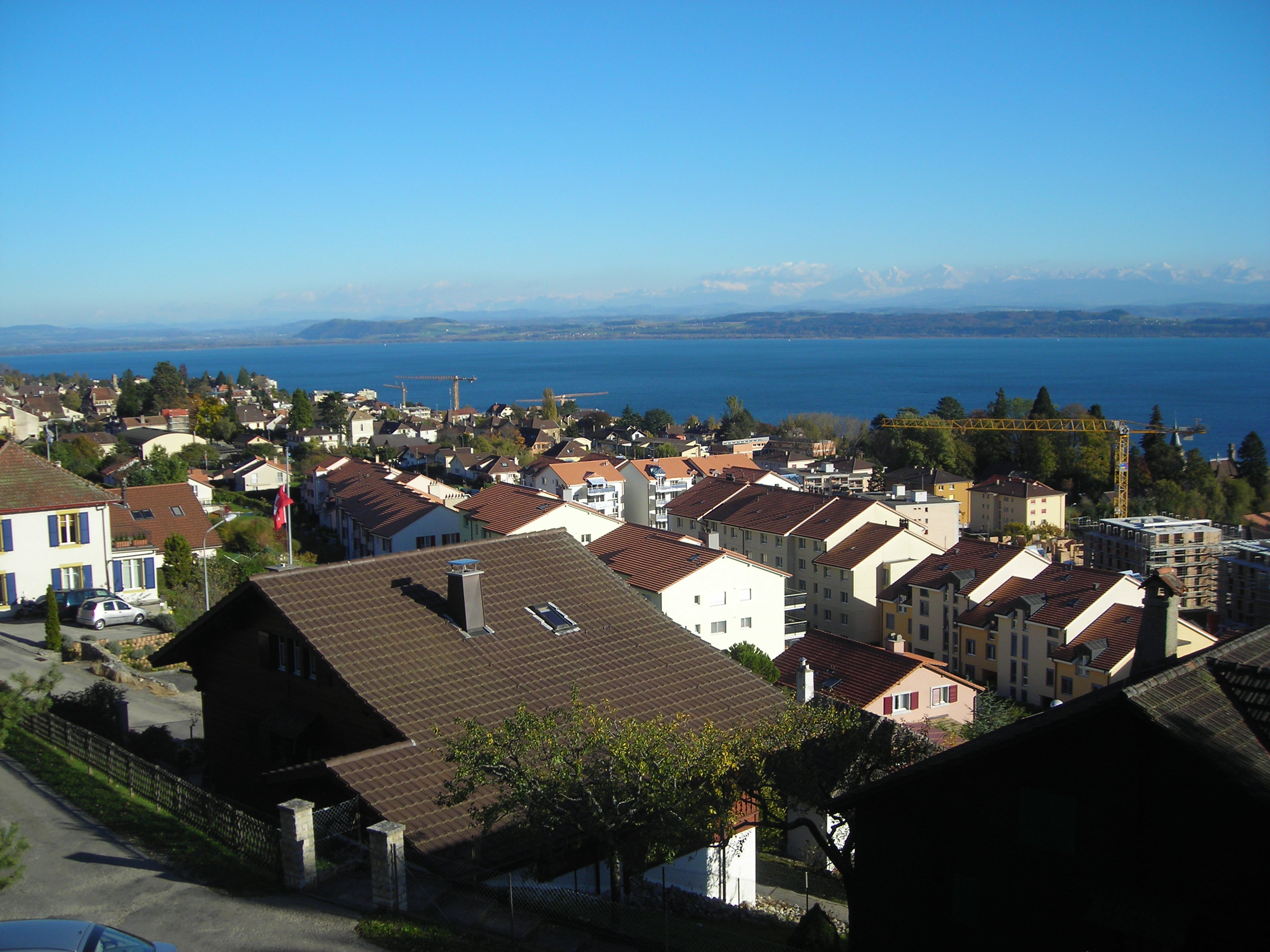 Lac de Neuchâtel et quartier des Cudeaux depuis le haut du village de Corcelles